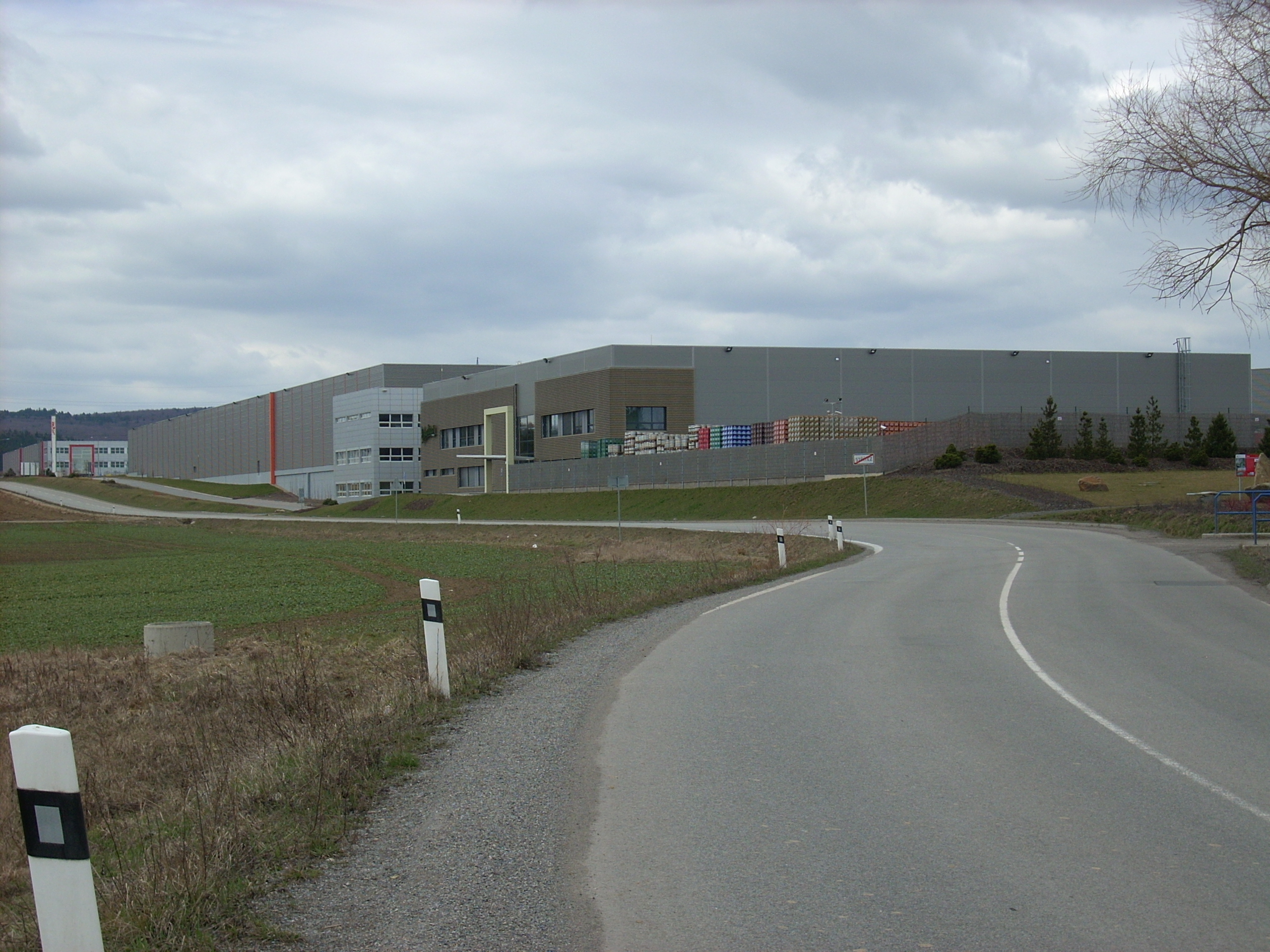 Logistický areál firmy Jipocar, Střítež, okres Jihlava